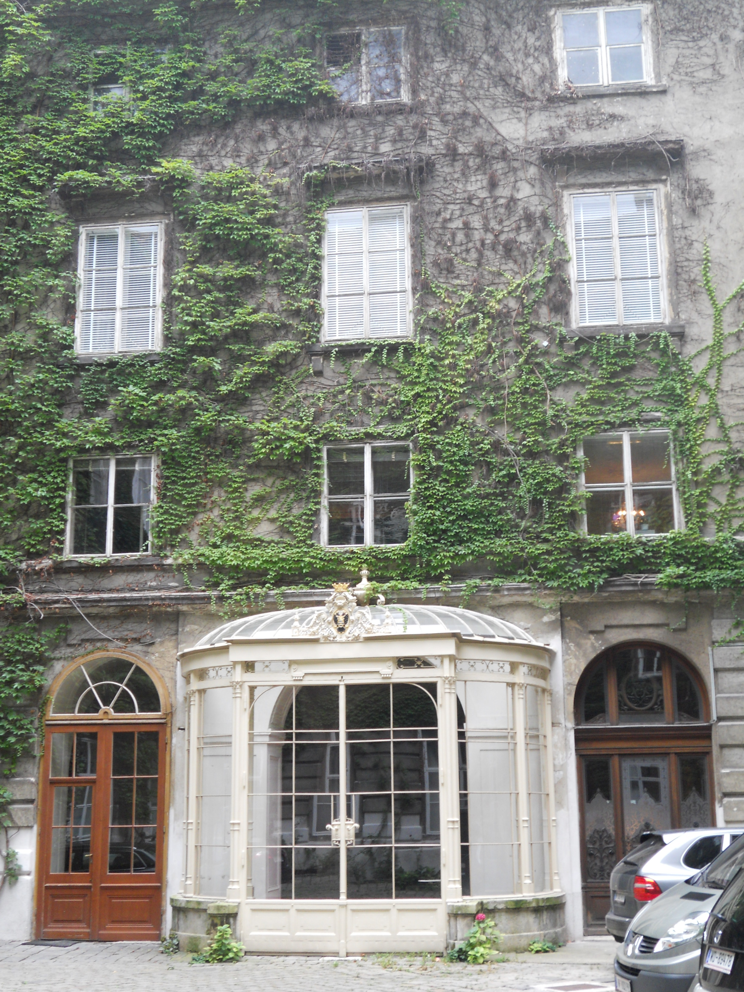 Friessches Zinshaus